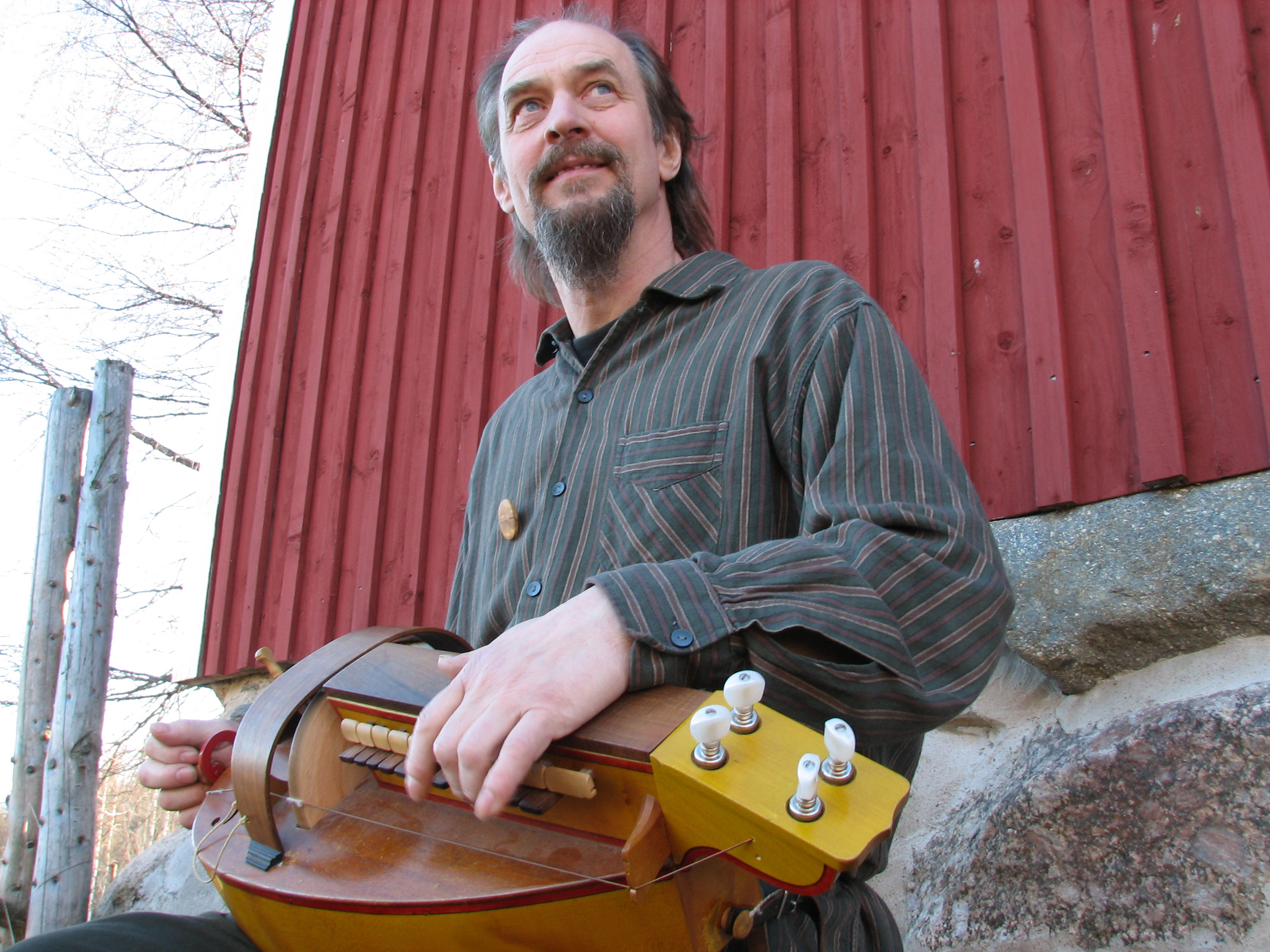 Tapio Mattlar en février 2010